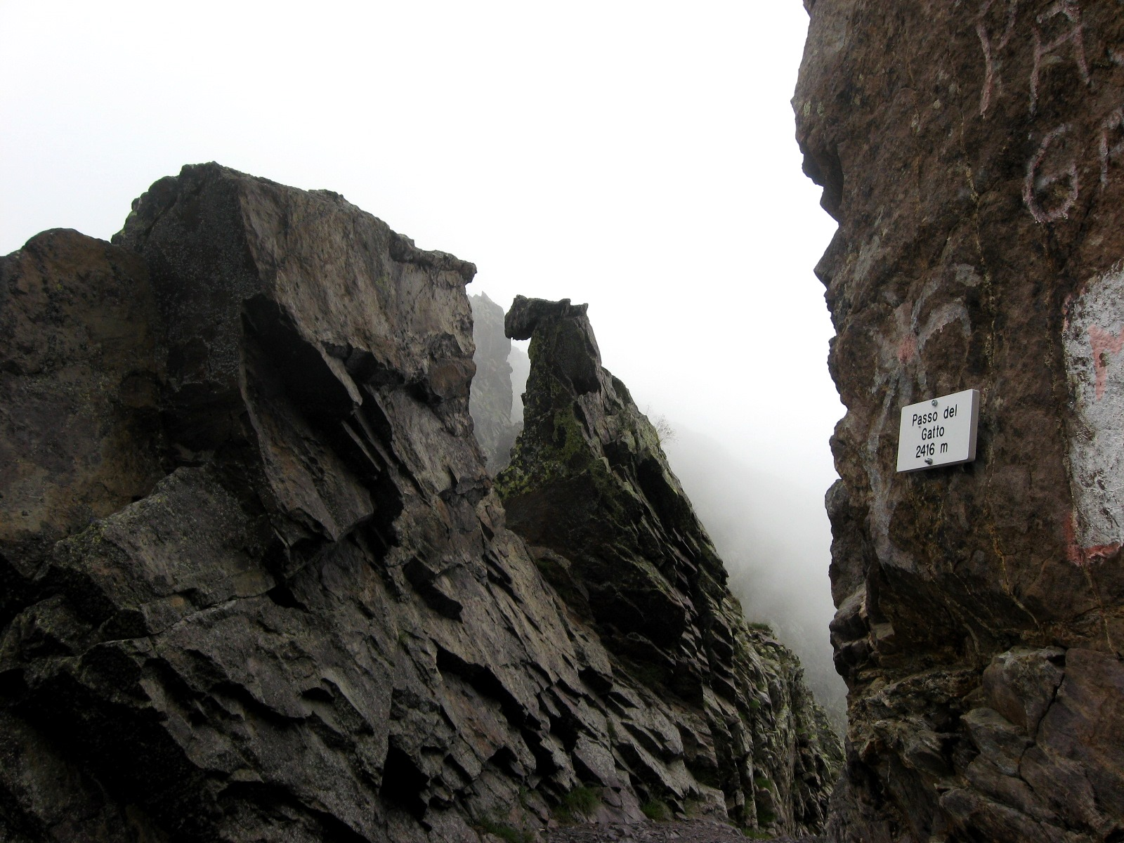 Il passo del Gatto (2.416 m.s.l.m.). Prealpi Orobie. Val di Scalve (BG)